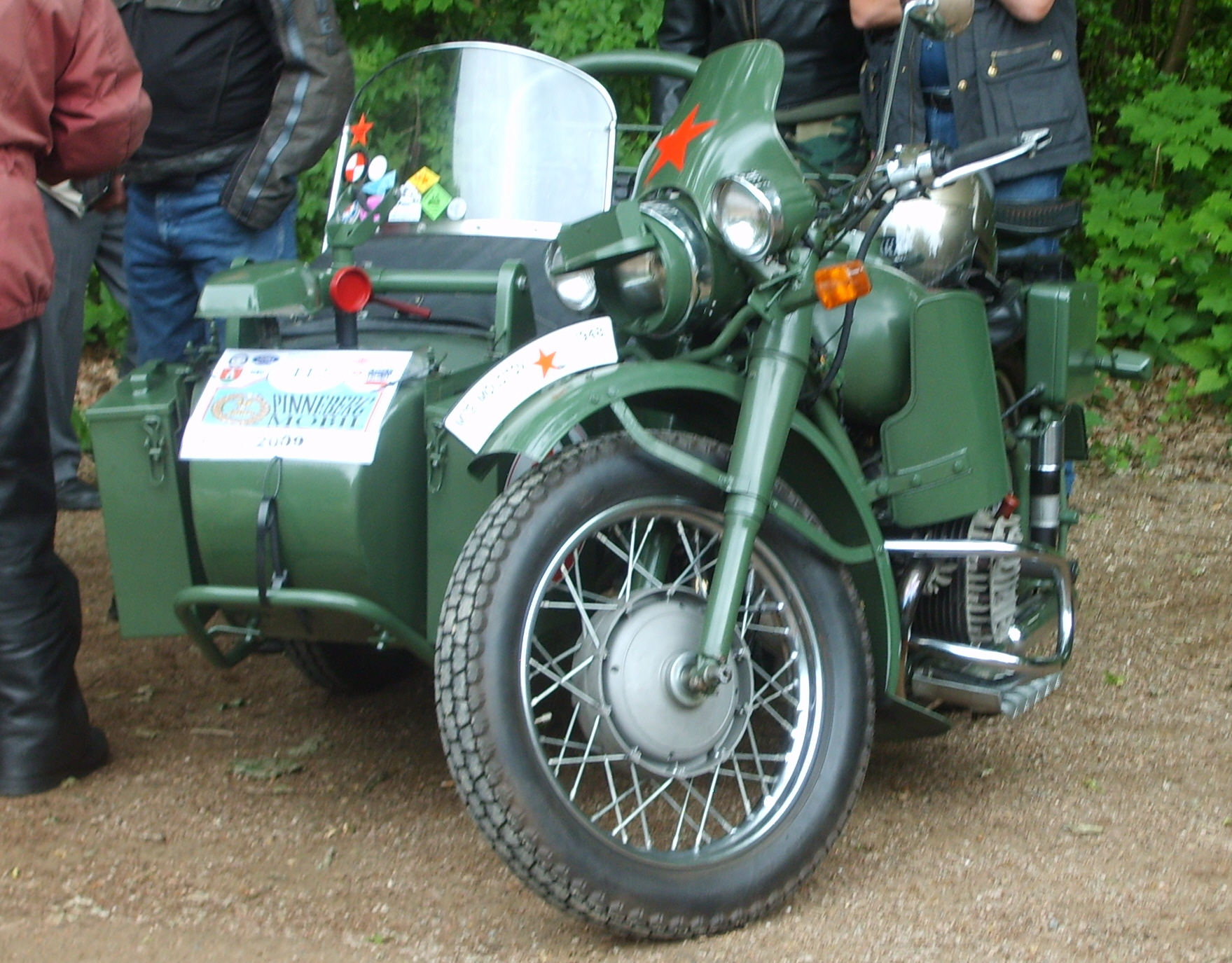 M72 Molotow 2 Zylinder, 750 ccm, 22 PS, Baujahr 1948 mit Seitenwagen beim Oldtimertreffen in Uetersen